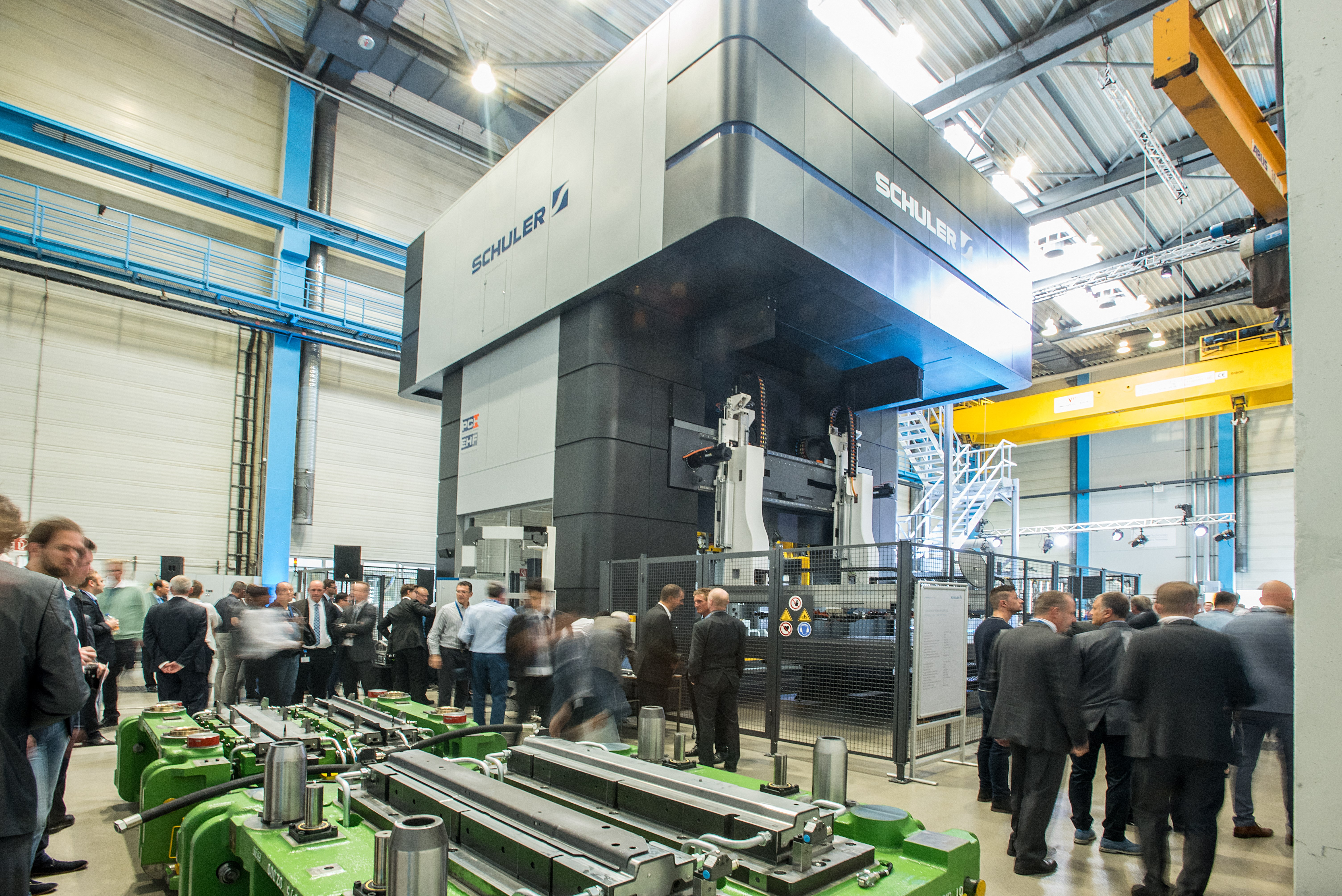 Hot Stamping TechCenter in Göppingen